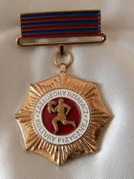 Złota Odznaka Zasłużony Działacz Kultury Fizycznej - Odznaczenie resortowe z czsów PRL-u.